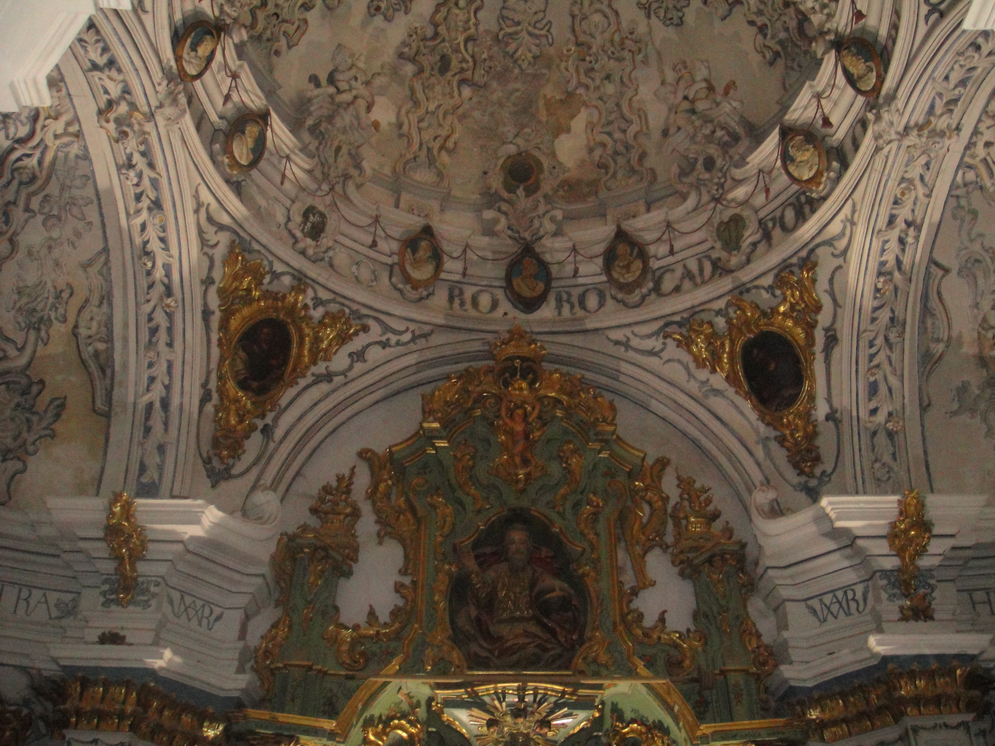 Interior del camarín de la iglesia de San Francisco de Fuente Obejuna.